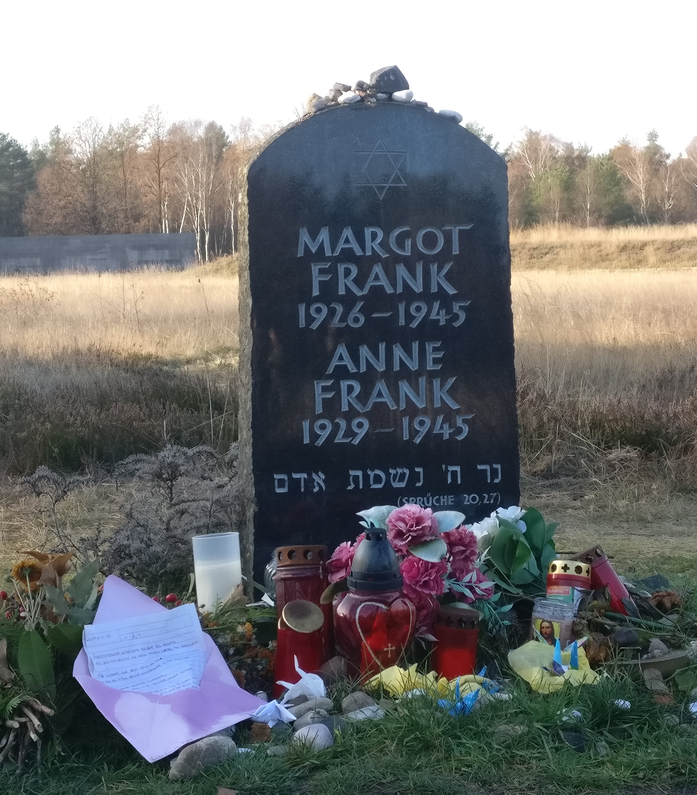 രണ്ടാം ലോകമഹായുദ്ധത്തിൽ കൊല്ലപ്പെട്ട ആൻ ഫ്രാങ്കിന്റേയും സഹോദരി മാർഗോട്ട് ഫ്രാങ്കിന്റേയും ശവകുടീരം - ബർഗൻ ബൽസൺ ക്യാംപ് ബർലിൻ.